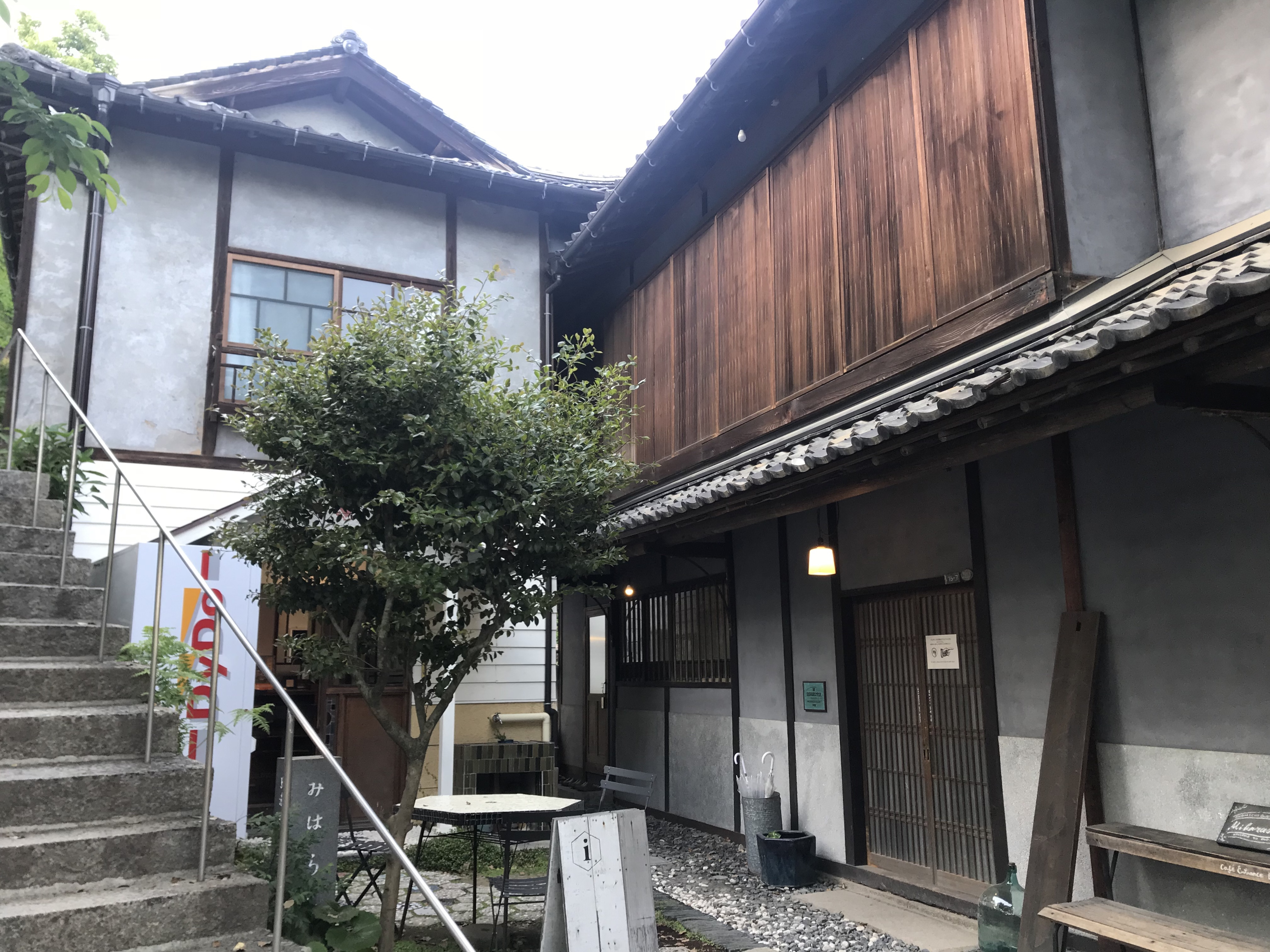 みはらし亭